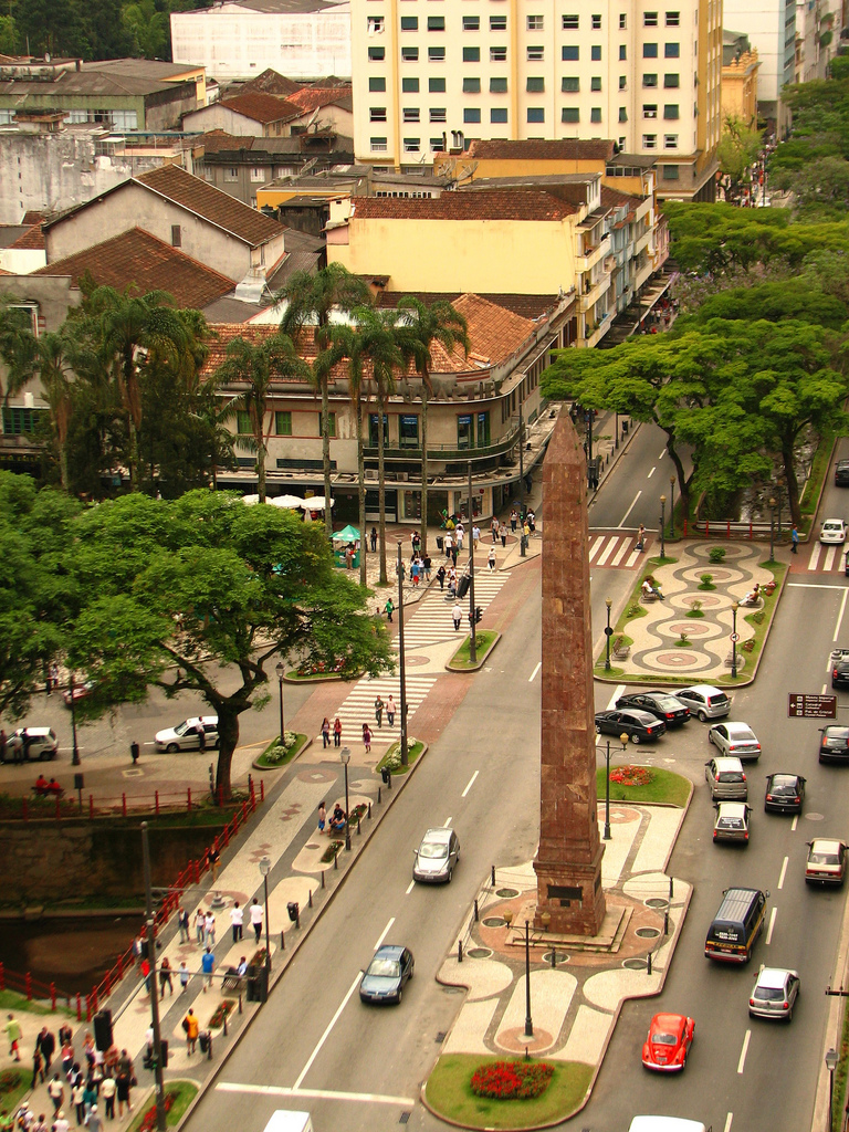 "Cidade Imperial": Petrópolis, RJ, Brasil.